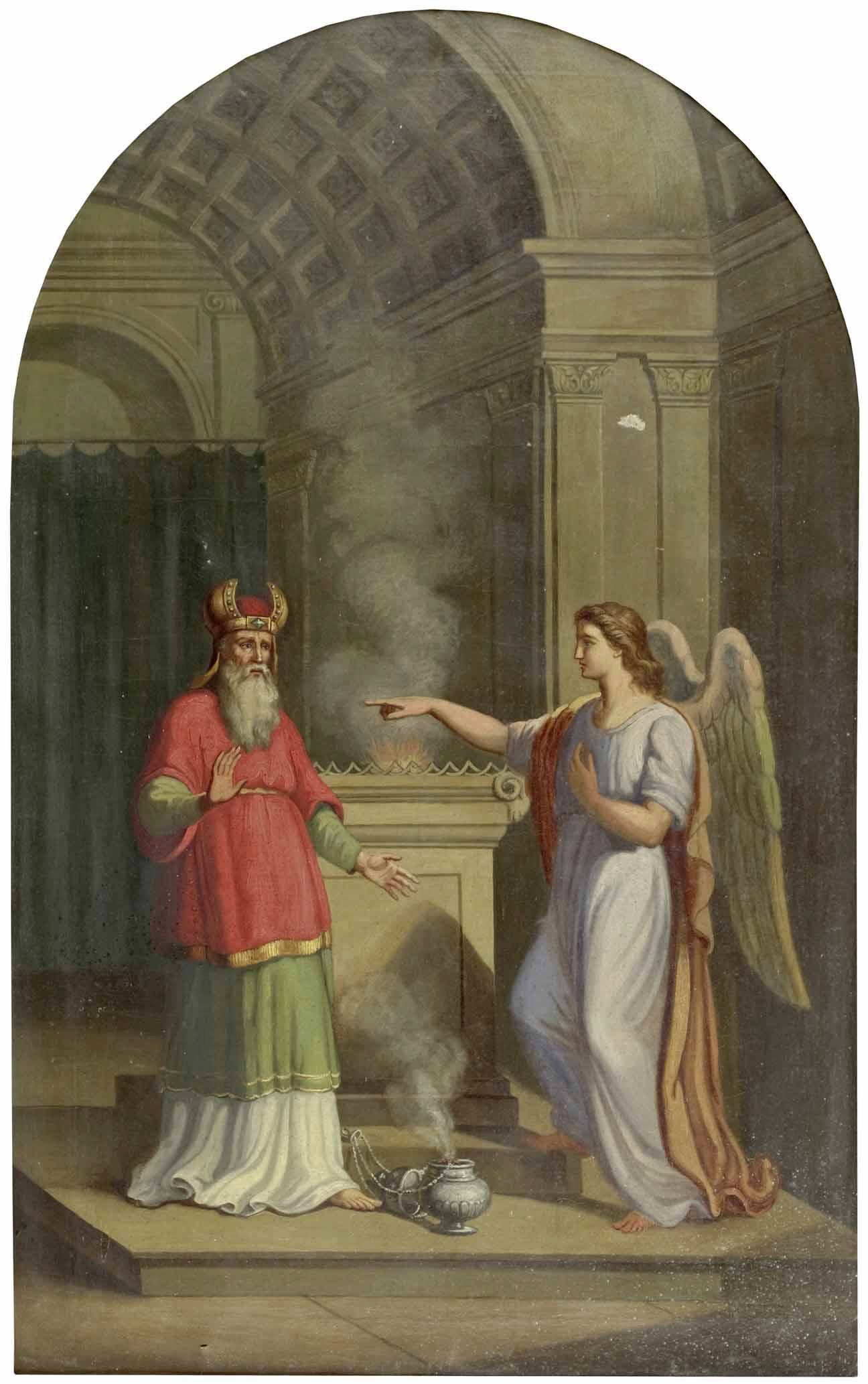 Dem Hl. Zacharias erscheint, als er im Tempel das Rauchopfer darbrachte, der Engel Gabriel (Lukas 1, 8-20), Öl auf Leinwand, oben geschweift, 128 x 79 cm.